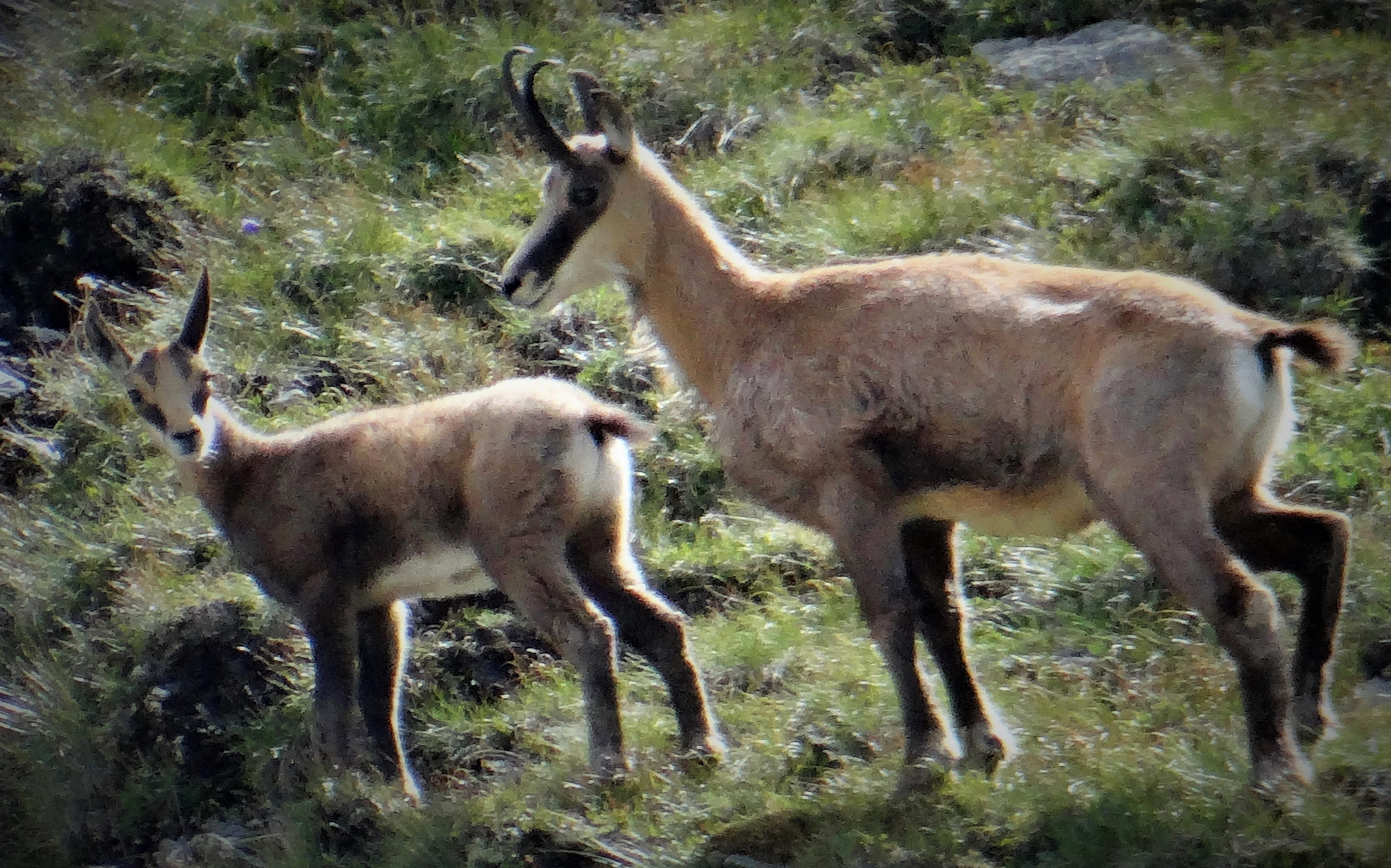 Chamois au cirque du Rosoire (2397m)